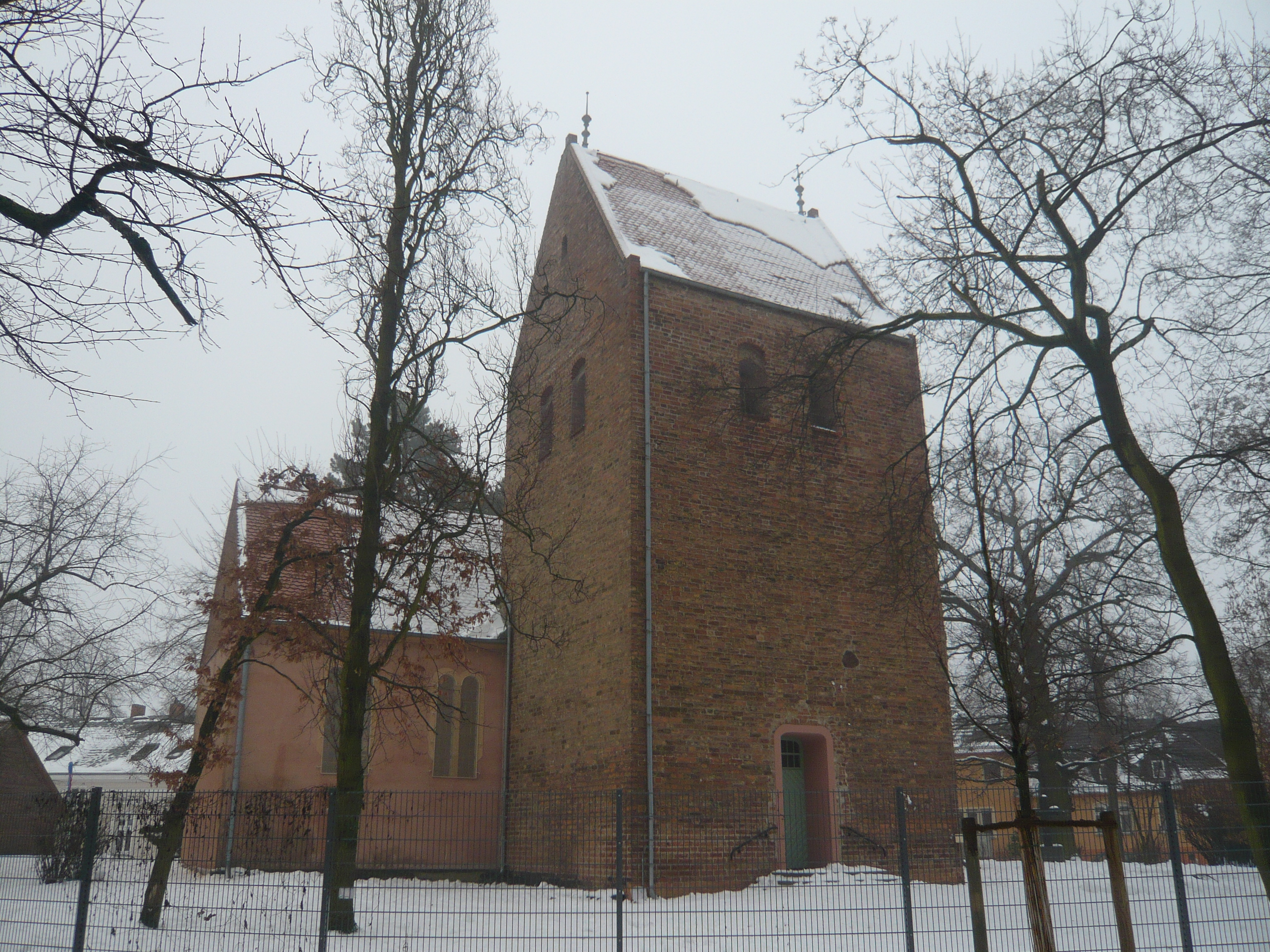 ev. Kirche in Falkensee, Dorfkirche Seegefeld in der Bahnhofstraße